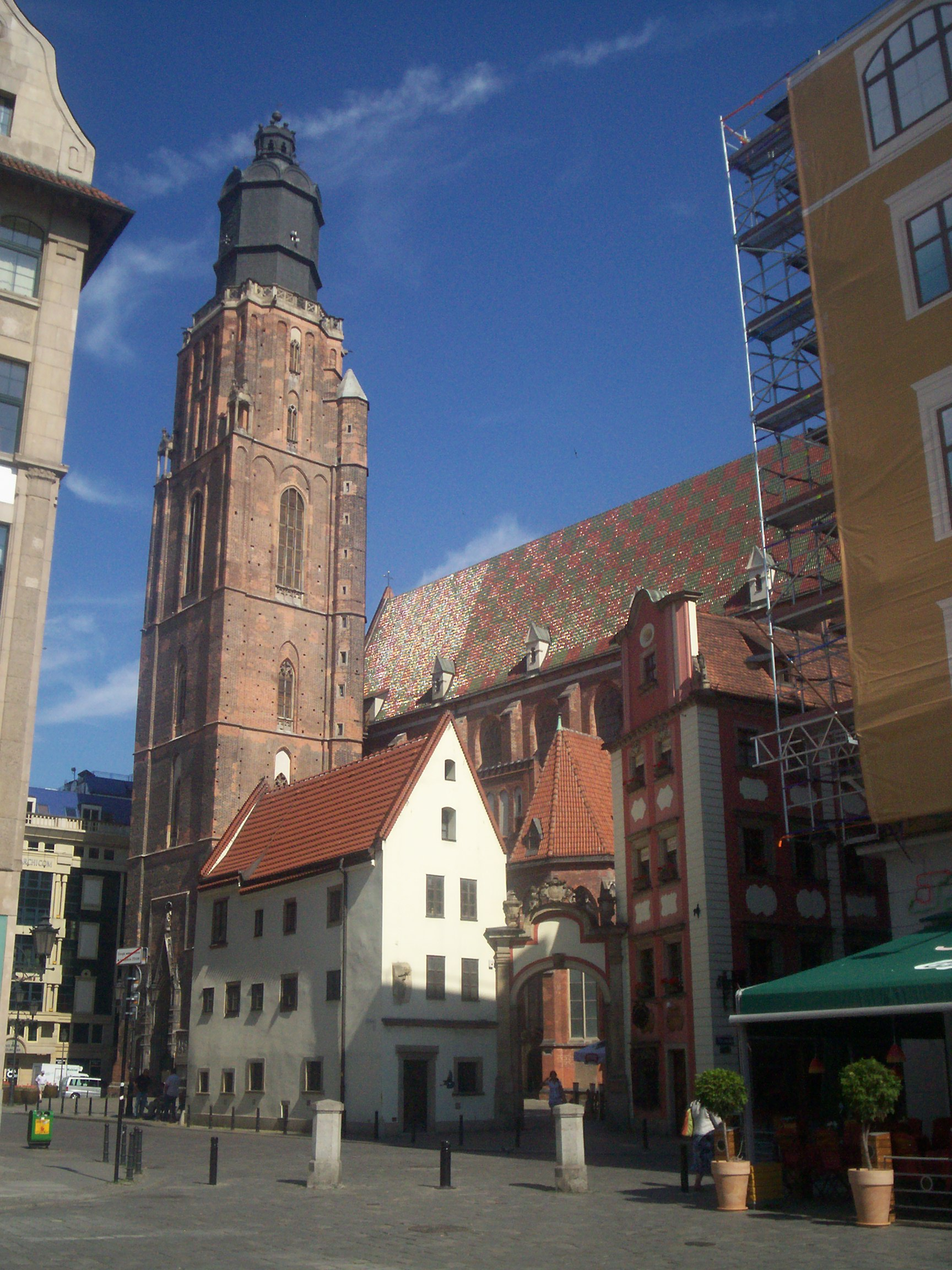 Wrocław, kościół pw. świętej Elżbiety.